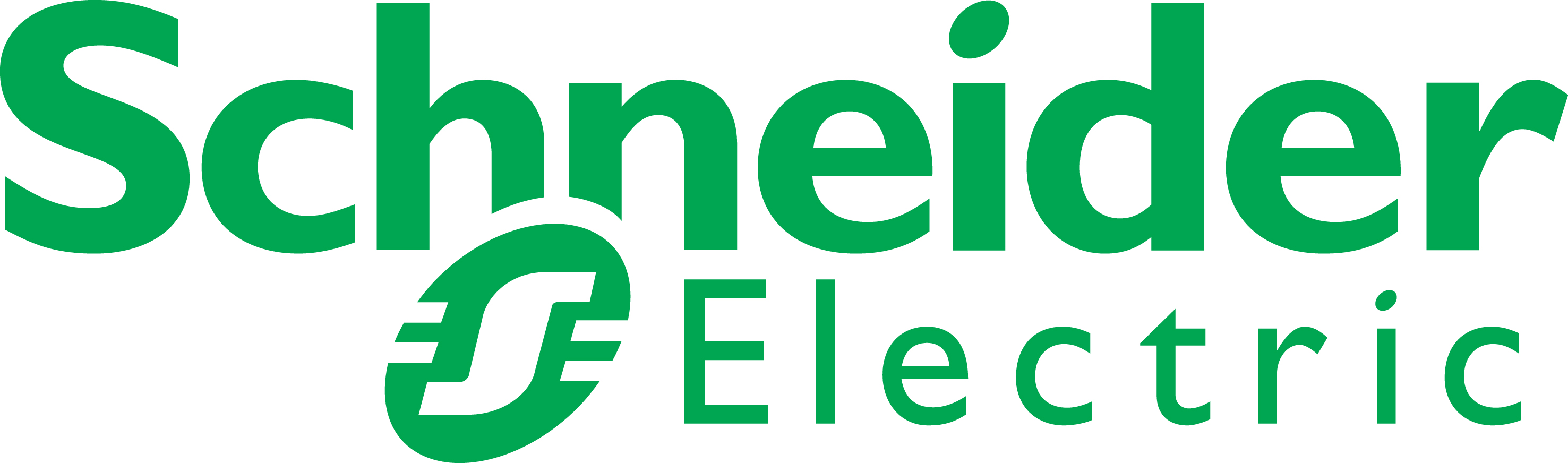 Logo empresa Schneider Electric